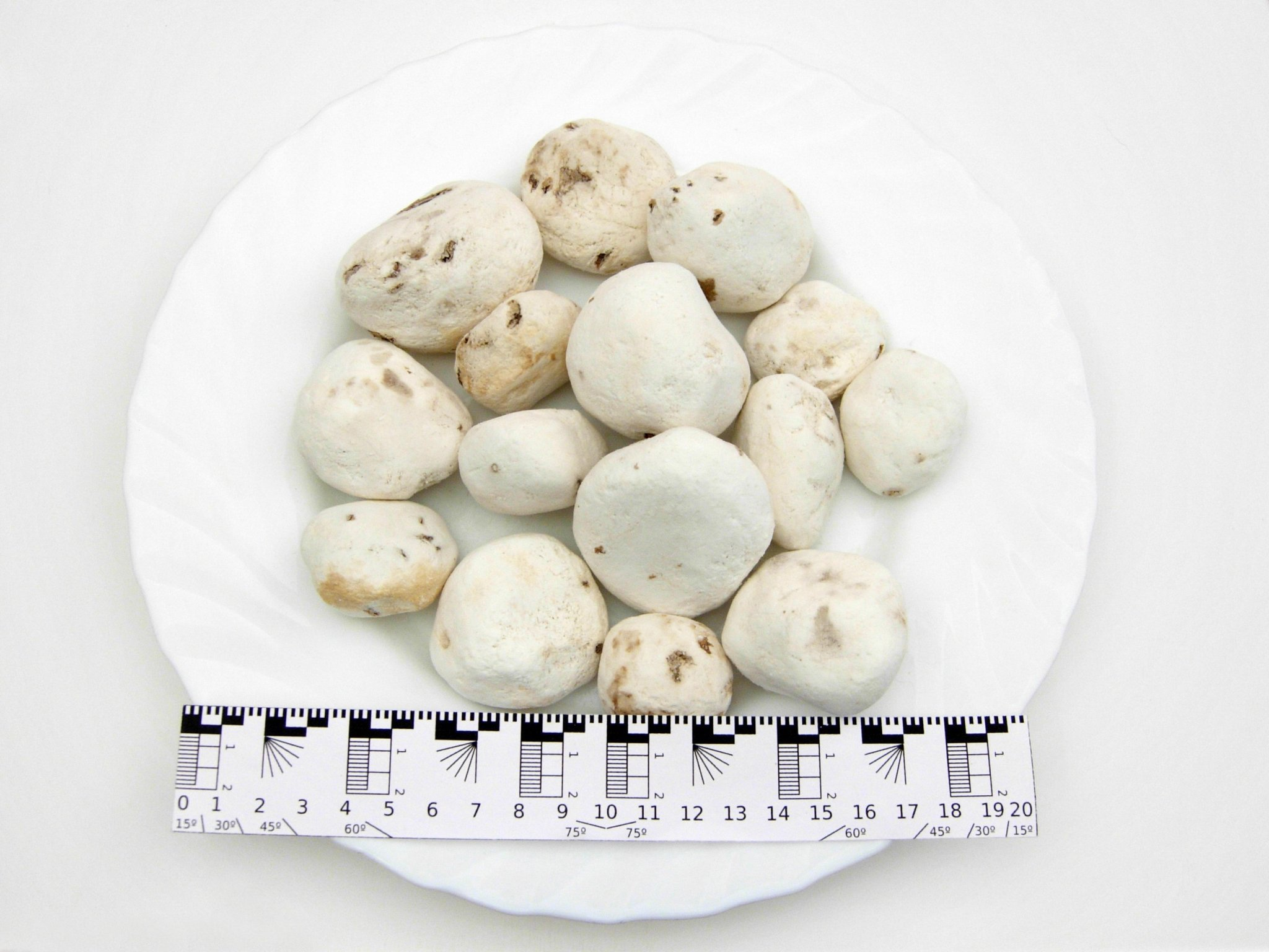 Montón de chuño blanco sobre un plato. Escala en centímetros.